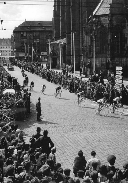 VIII. Friedensfahrt, Fahrerfeld Zentralbild CTK-II 6.5.1955 - 4. Etappe der VIII. Internationalen Friedensfahrt. Am 5. Mai absolvierten die Teilnehmer des 8. Internationalen Friedensrennens die vierte und längste Etappe in der Tschechoslowakei von Tabor nach Karlovy Vary, die 215 km lang war. Sieger der vierten Etappe wurde J. Krivka (Tschechoslowakei) vor Werschinin (UdSSR), Georgieff (Bulgarien) und Schur (DDR). UBz: Die Rennfahrer in der Stadt Plsen.